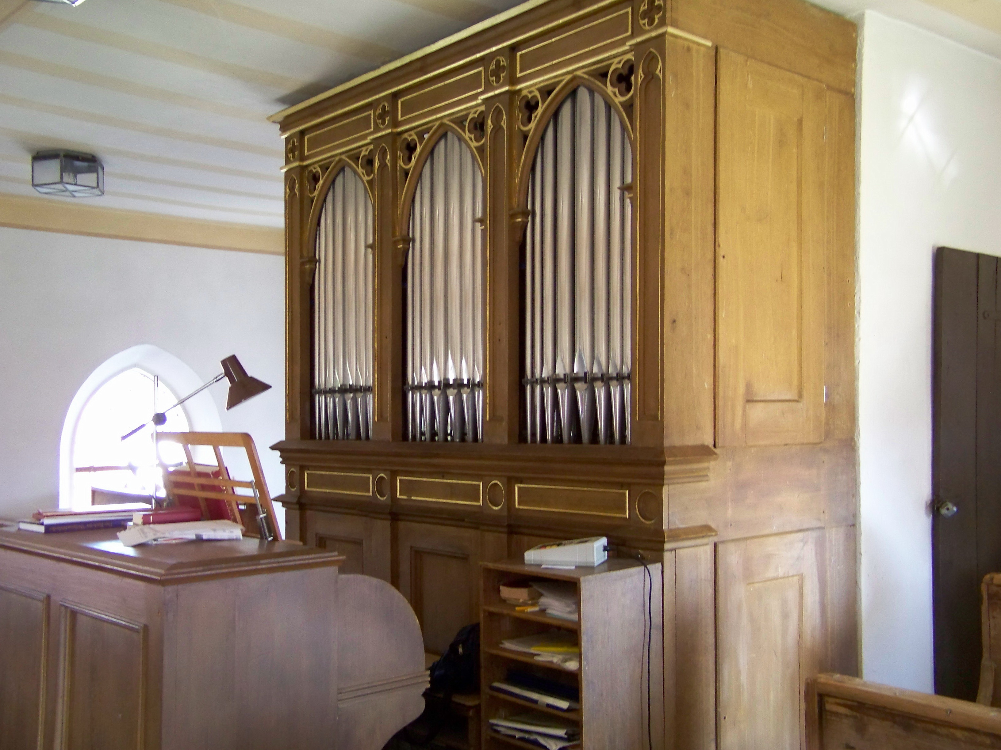 Laberweinting, Franken 13, katholische Expositurkirche St. Nikolaus. Die Kirche wurde 1869 erbaut. Die Ausstattung ist neugotisch. Einmanualige Pfeifenorgel mit Pedalwerk auf der Südempore. Die Orgel stammt vom Regensburger Orgelbauer August Hartmann. Hauptwerk: Principal 4′ Gedeckt 2′ Waldflöte 8′ Pedalwerk: Subbass 16′